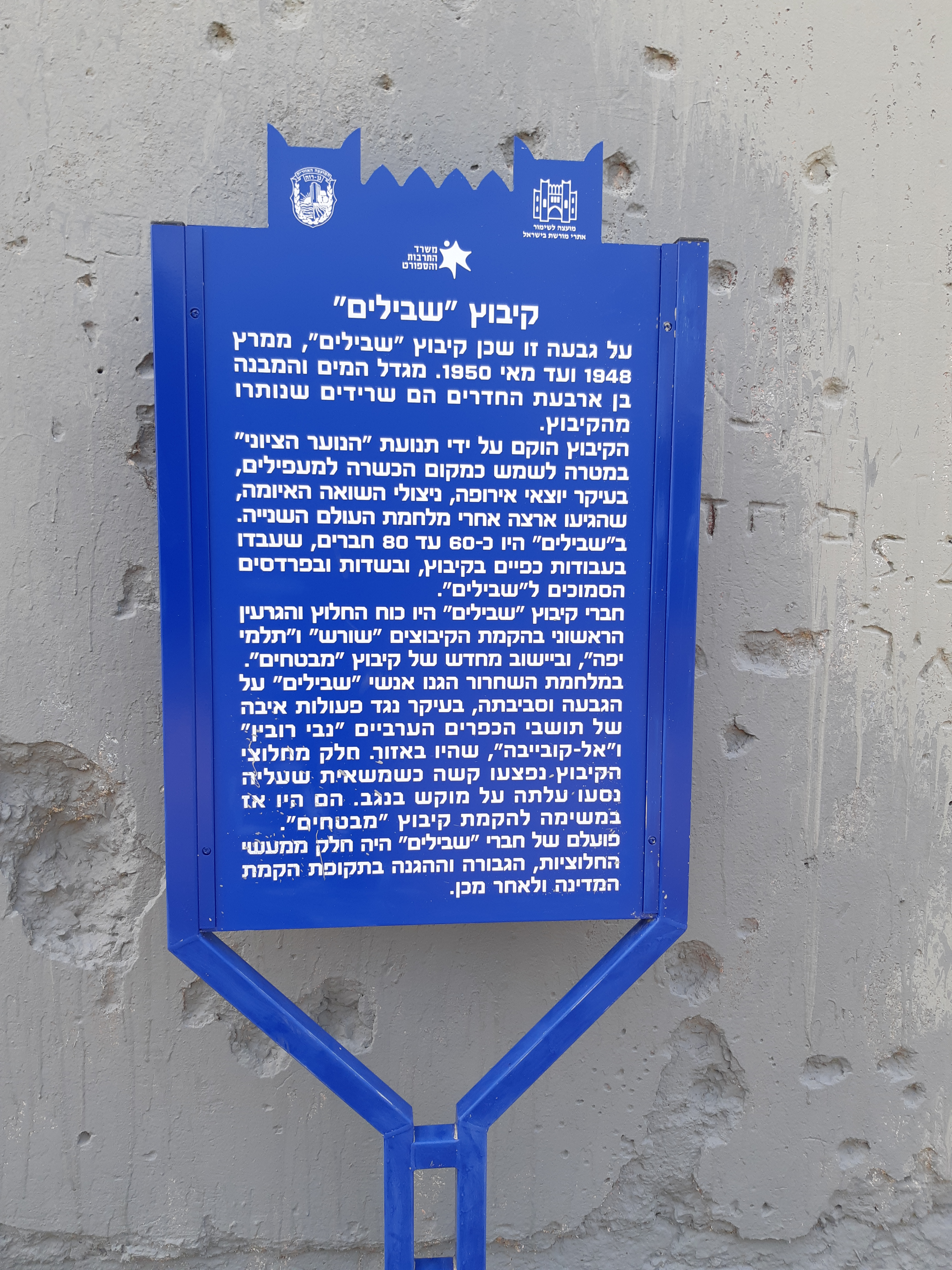 קיבוץ שבילים - השלט